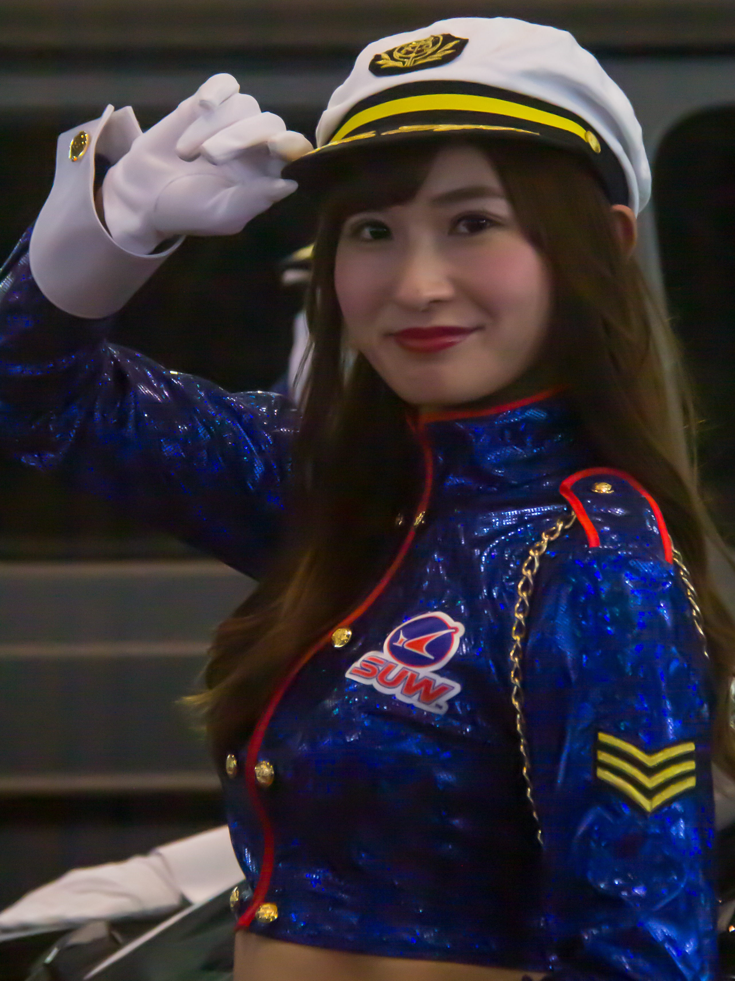 東京オートサロン2019 まあみ